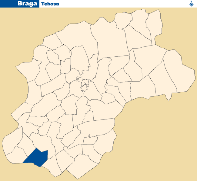 Localização de Tebosa no concelho de Braga.